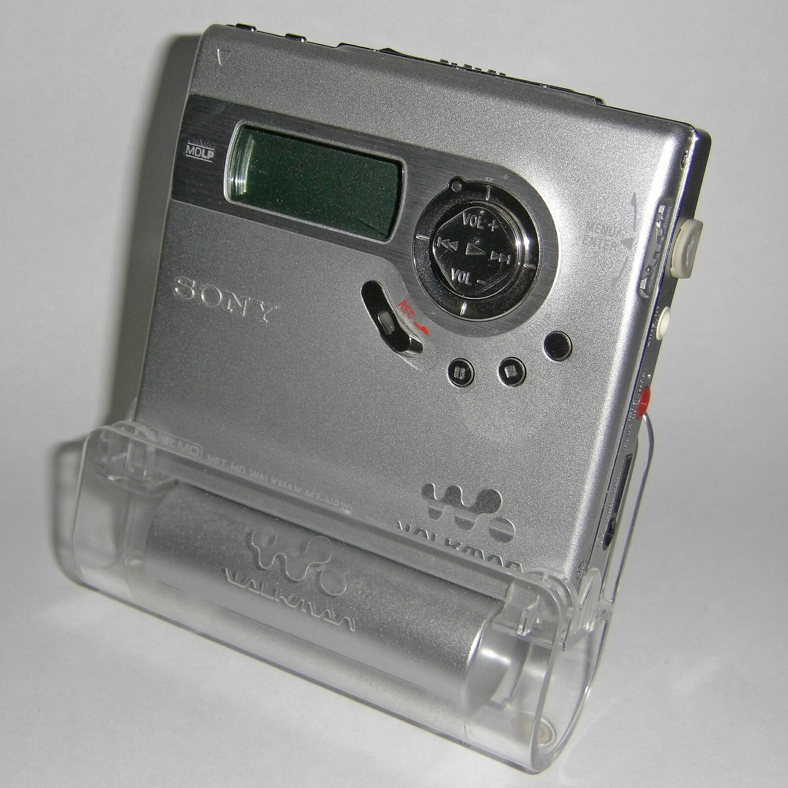 ソニー・MDウォークマン（MZ-920）